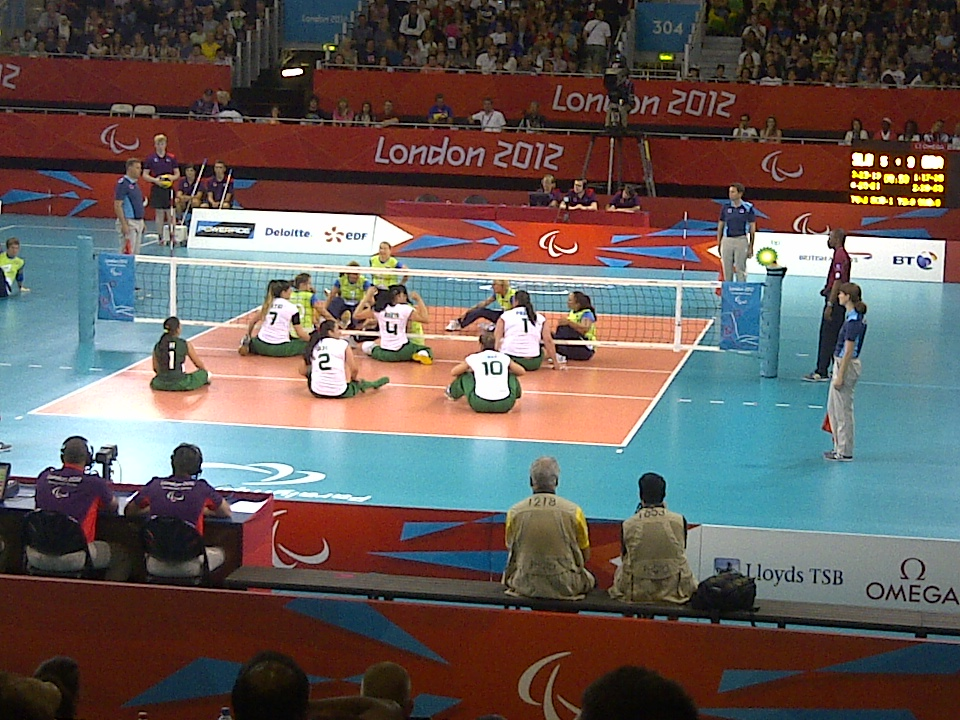 IMG-20120902-00289 (1)